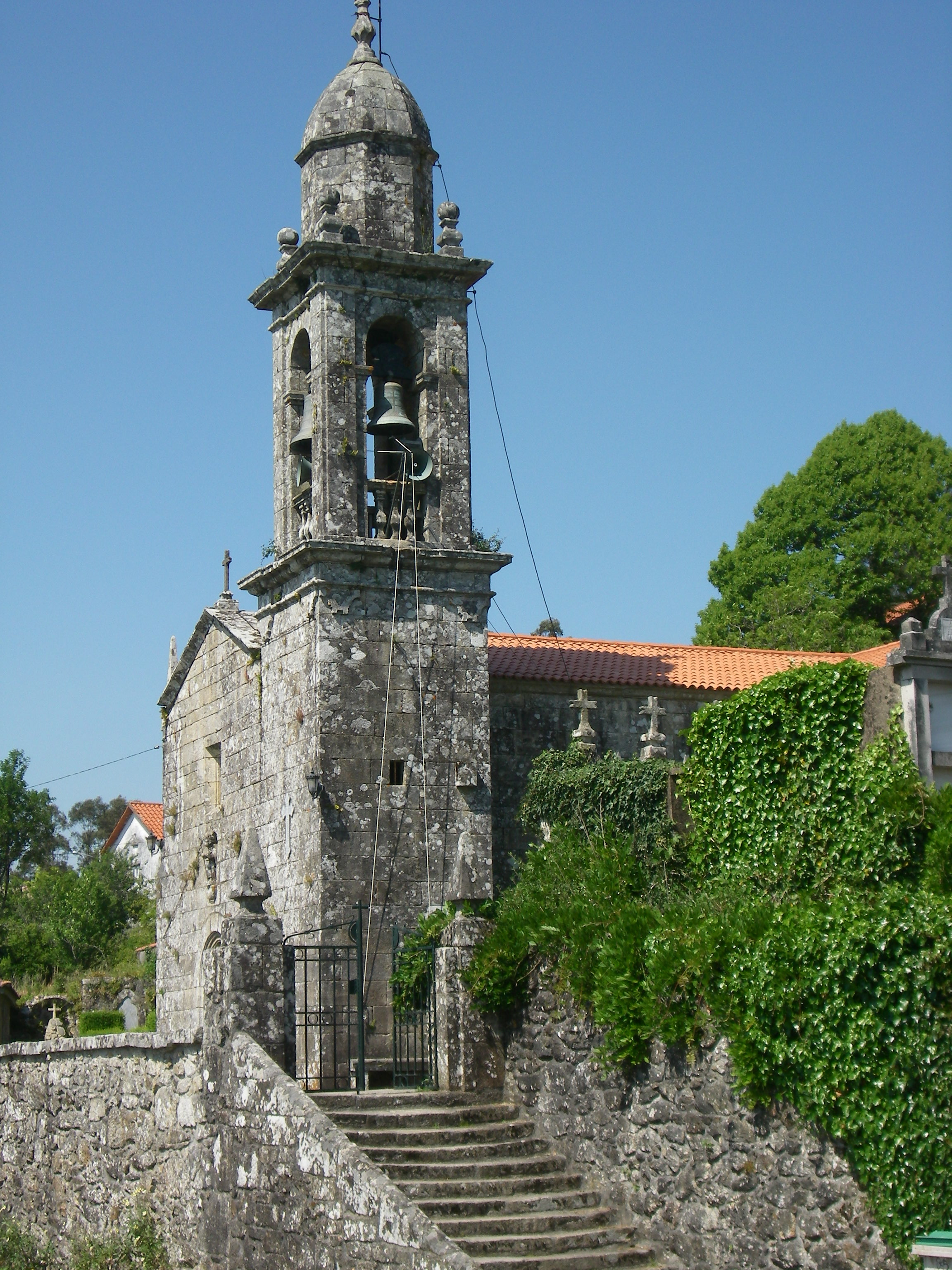 Igrexa de Fontenla (Moraña)